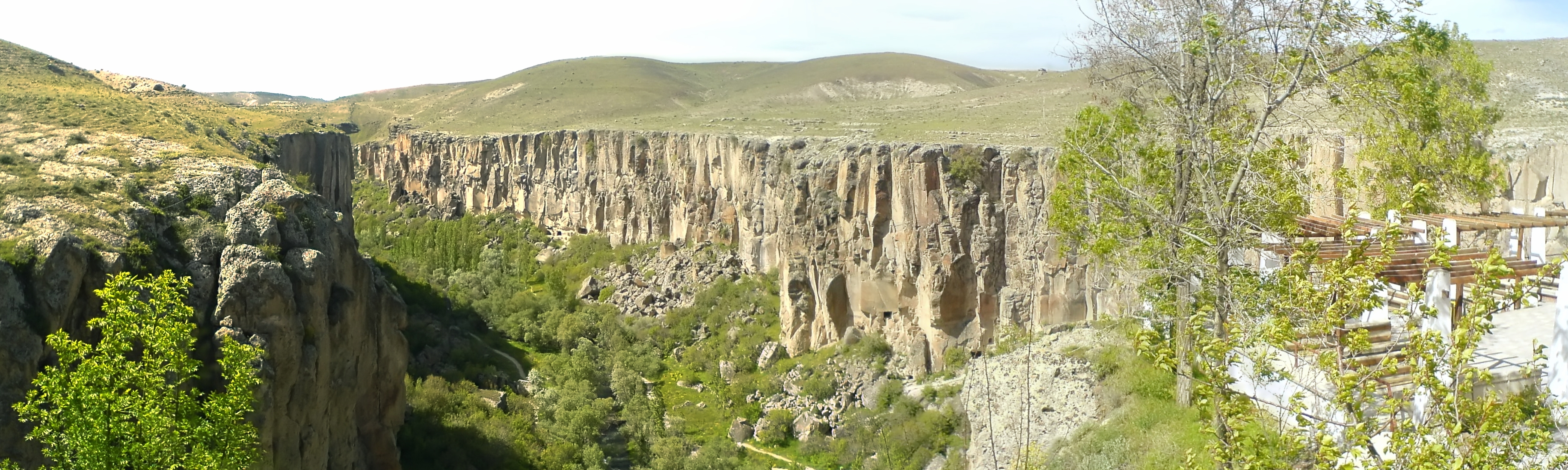 Resim, benim tarafımdan çekilen 6 resmin birleştirilerek panoromik hale getirilmesinden oluşmuştur.